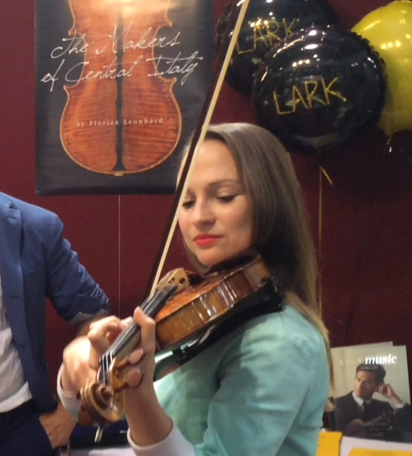 Olga Kholodnaya playing the Willemotte Stradivarius in Cremona.